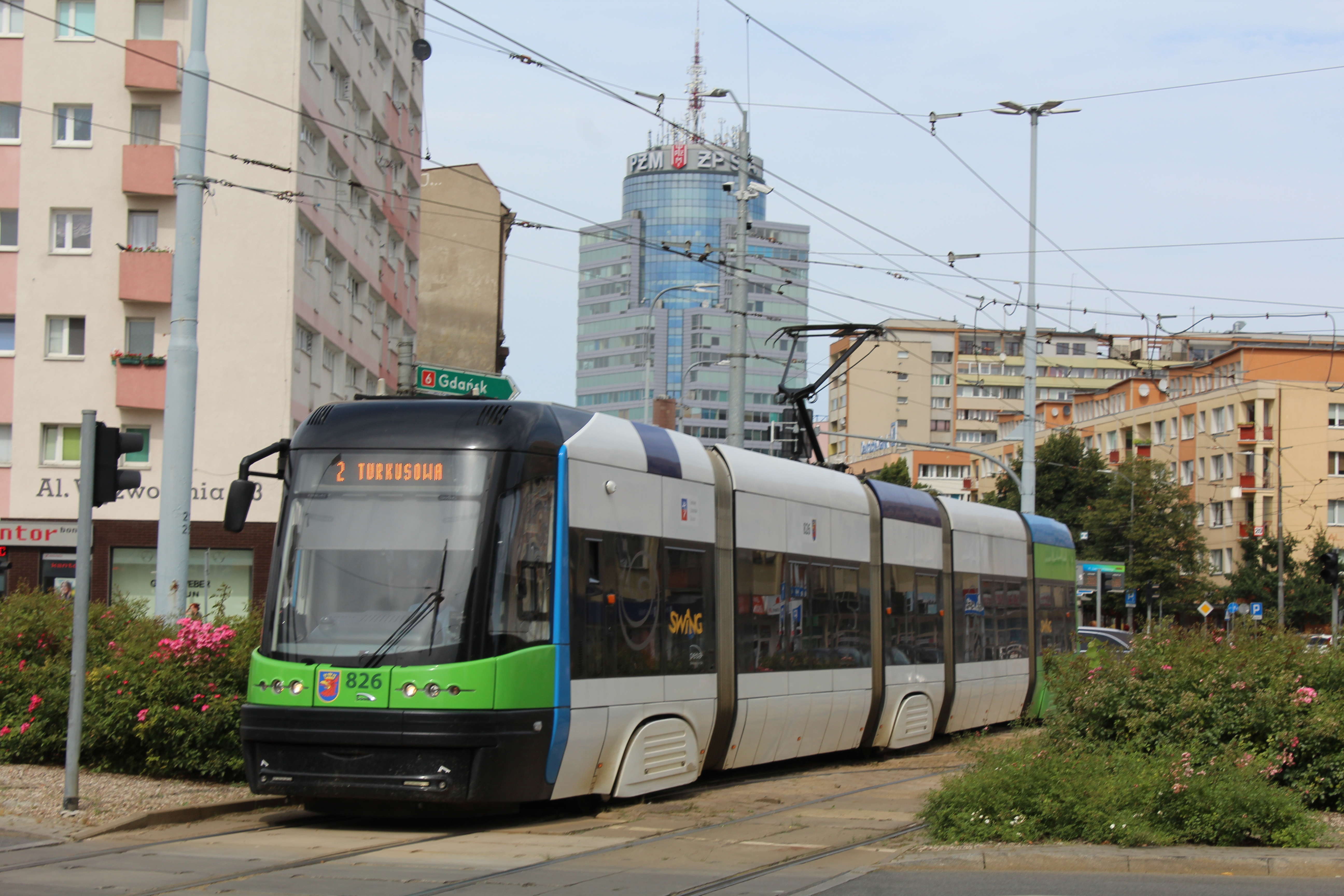 Tramwaj Pesa 120NaS2 Swing w Szczecinie, 2017 r.